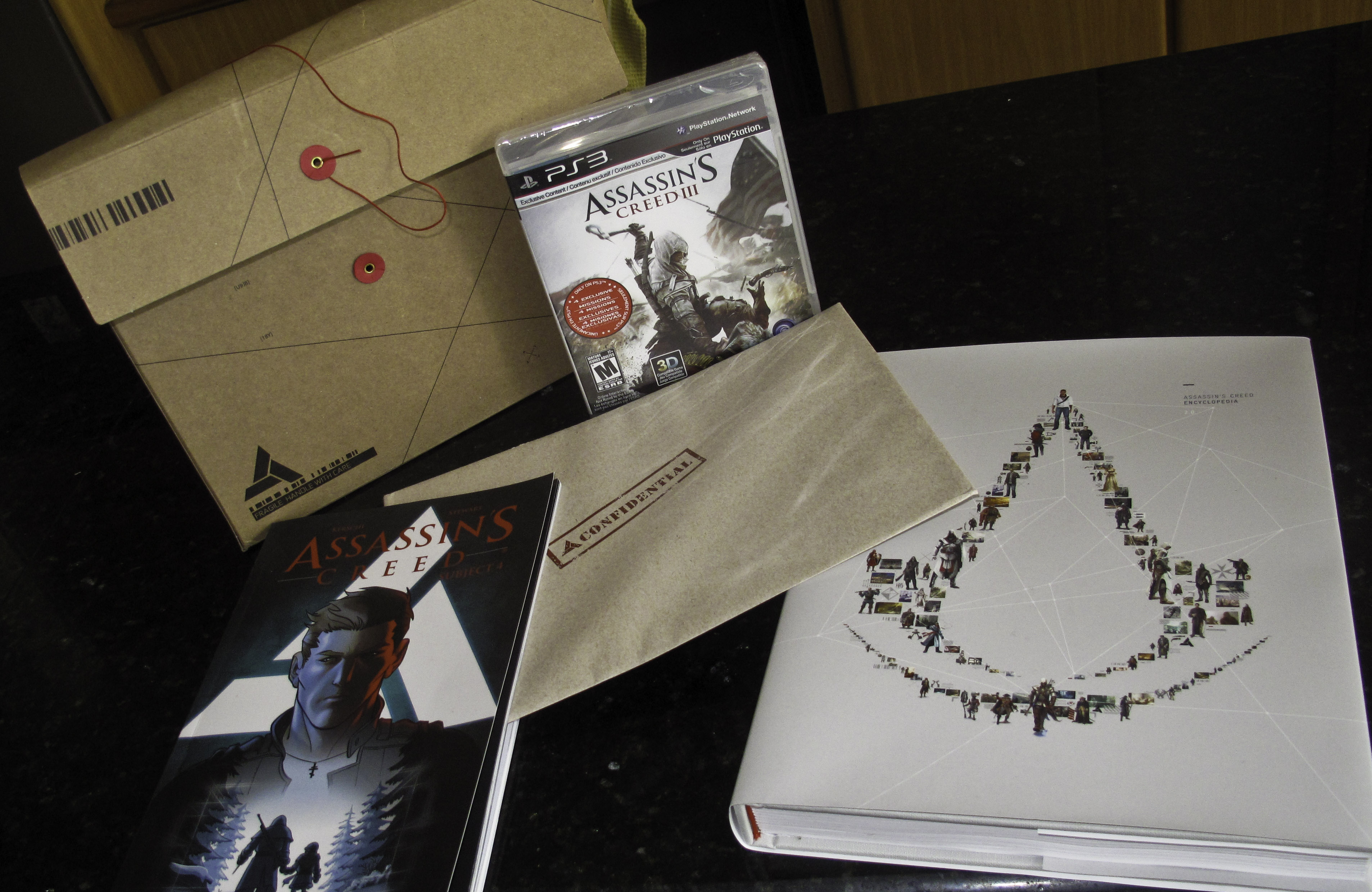 Para mi, el juego del año. Seguido de cerca por Dishonored.